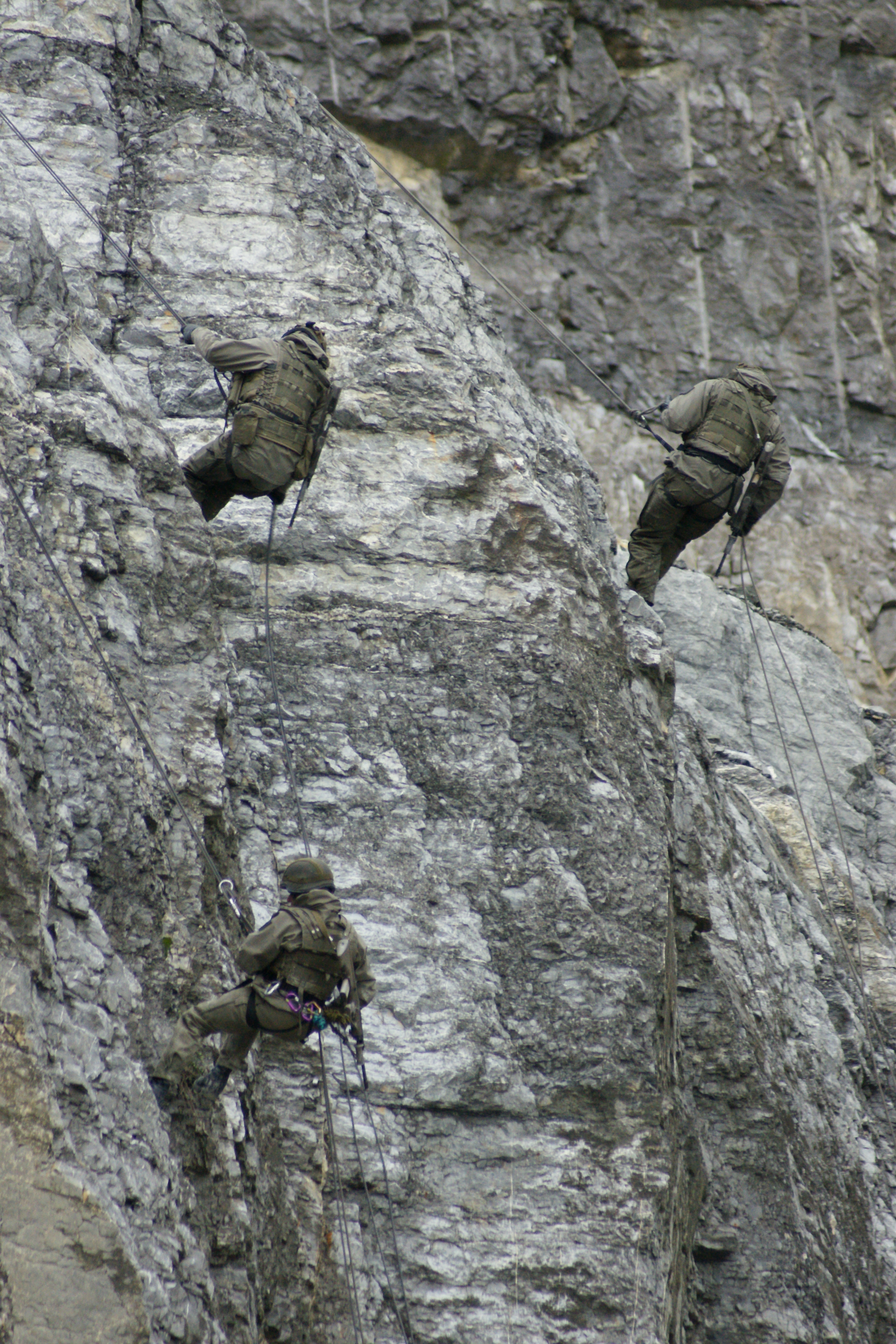 Im Zuge einer Road-Show zeigte das Österreichische Bundesheer im Dornbirner / Hohenemser Steinbruch Übungen des Jägerbataillon 23 (Österreichisches Bundesheer).